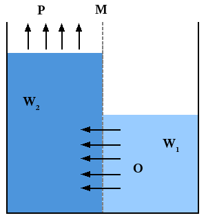 Blue energy cell mechanism